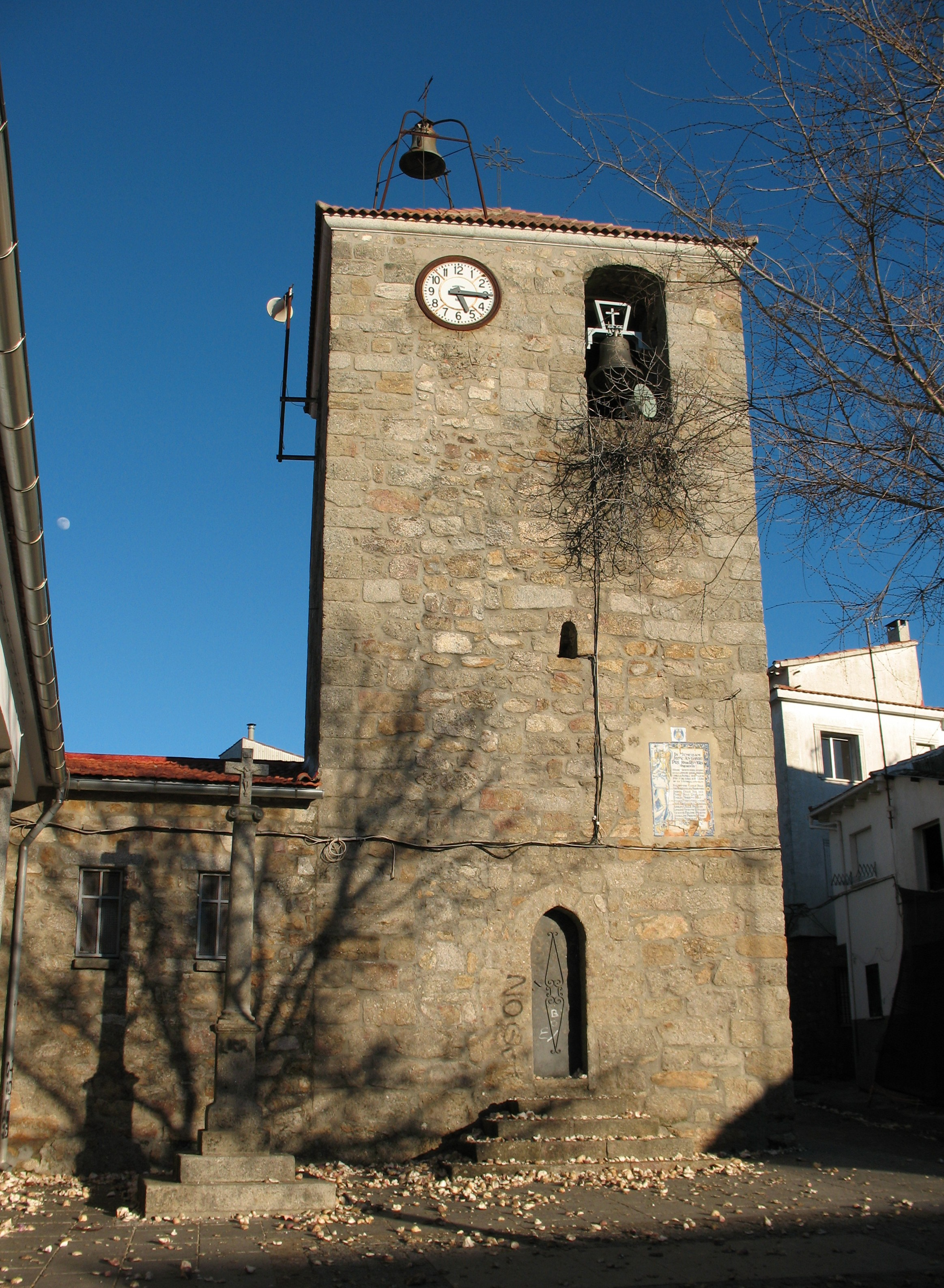 Iglesia de San Juan en el pueblo cacereño de Piornal